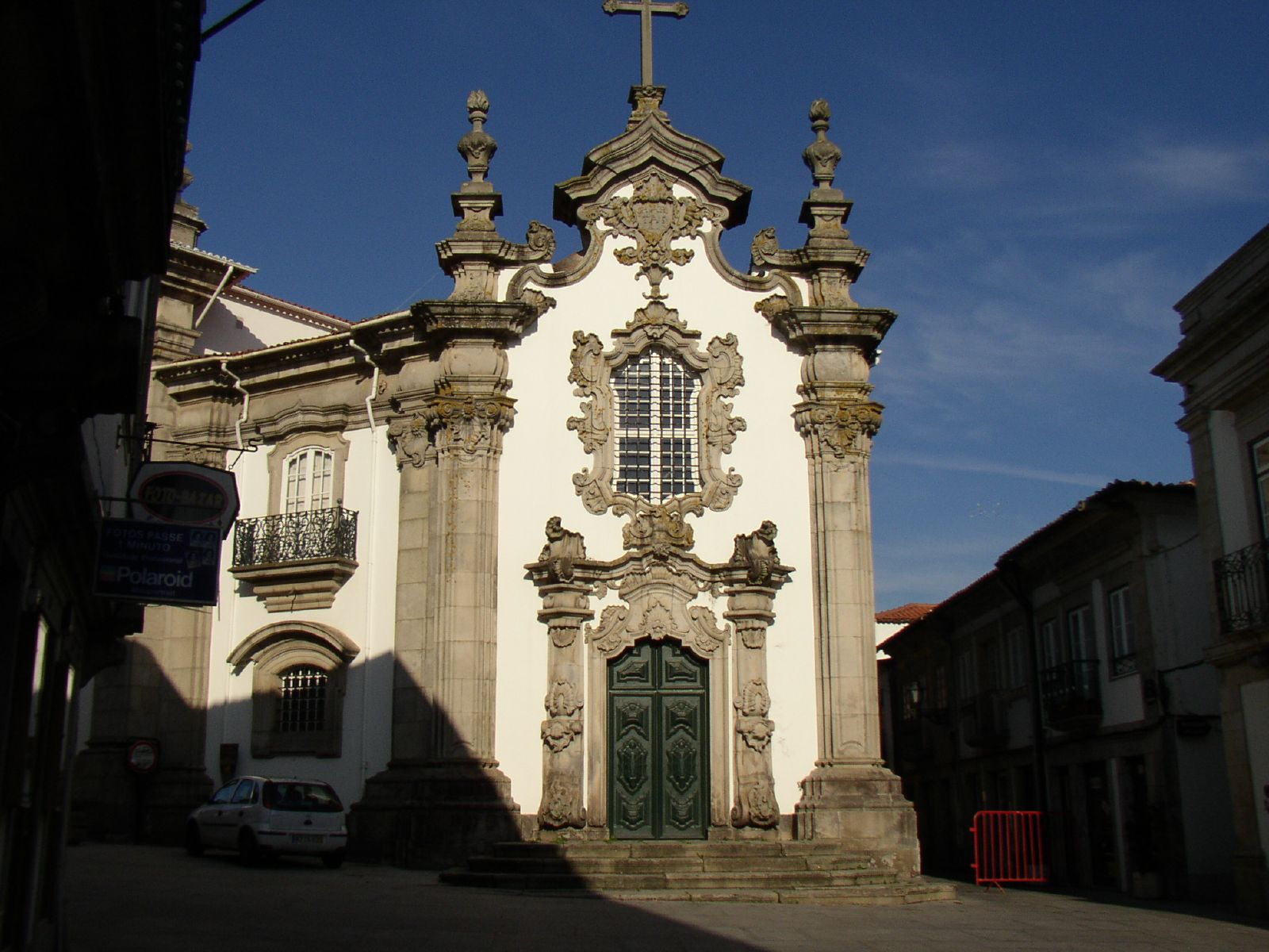 Malheiras Chapel in Viana do Castelo, Portugal